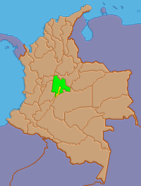 Mapa de localización de Cundinamarca, Colombia